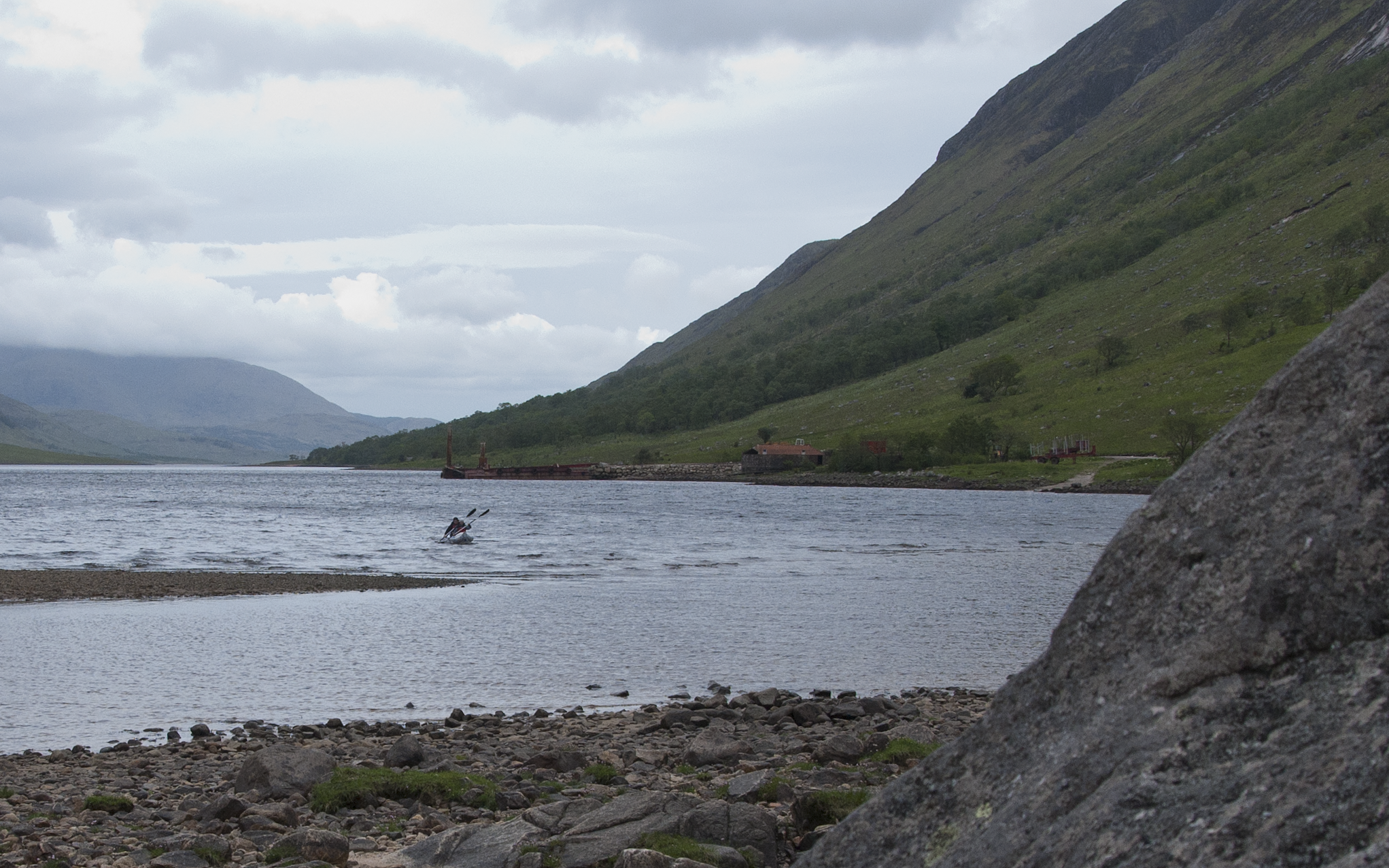 De mobiele pier voor houttransport op Loch Etive, Schotland